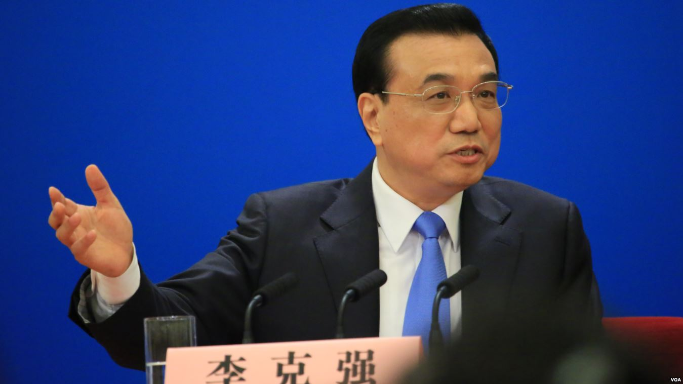 中國國務院總理李克強舉行中外記者會，答記者問。